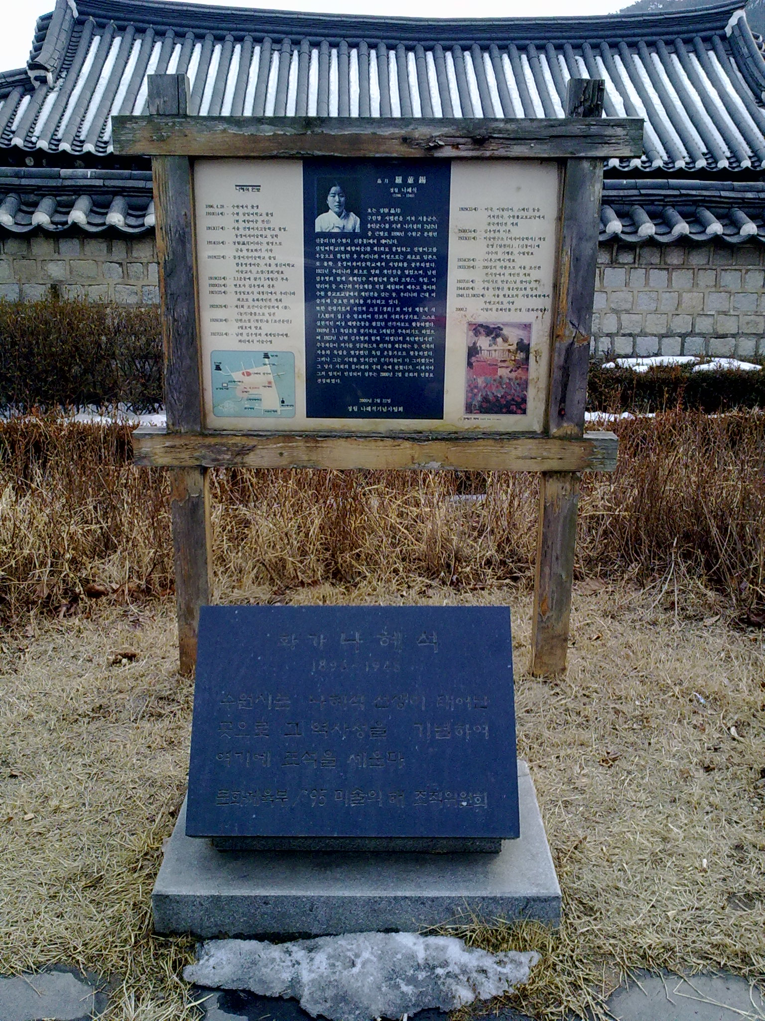 나혜석 표석. 수원 화성 안 화령전 옆에 있다.